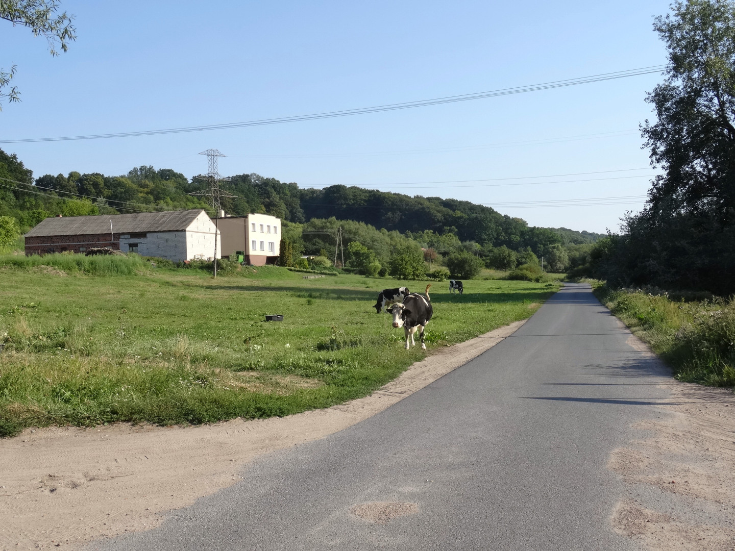 Mozgowina, gmina Dąbrowa Chełmińska